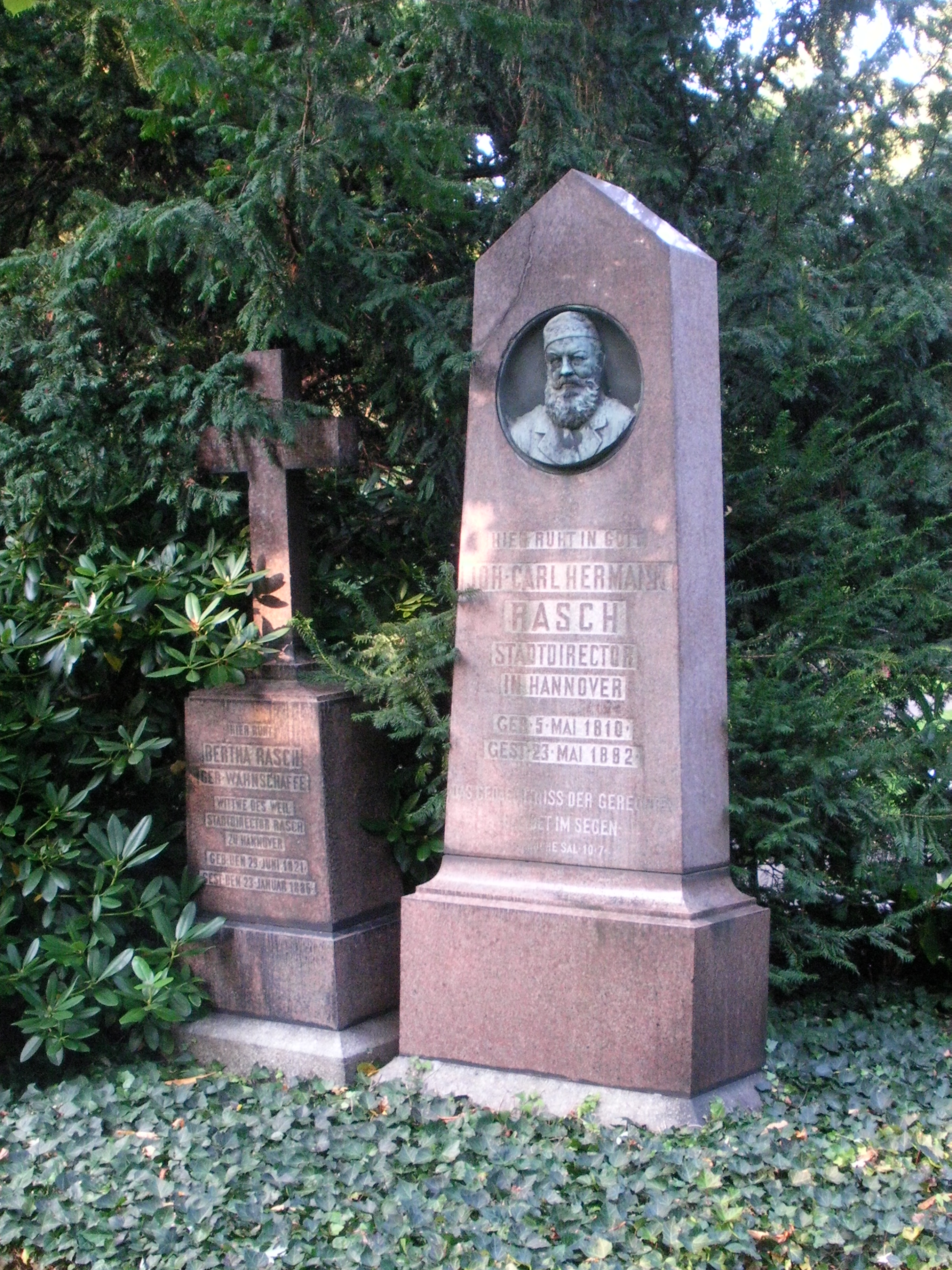 Grabstätte Rasch auf den Stadtfriedhof Engesohde